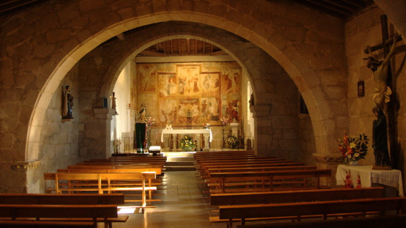 Interior de la Iglesia de La Vídola. Al fondo, el altar con los frescos medievales.